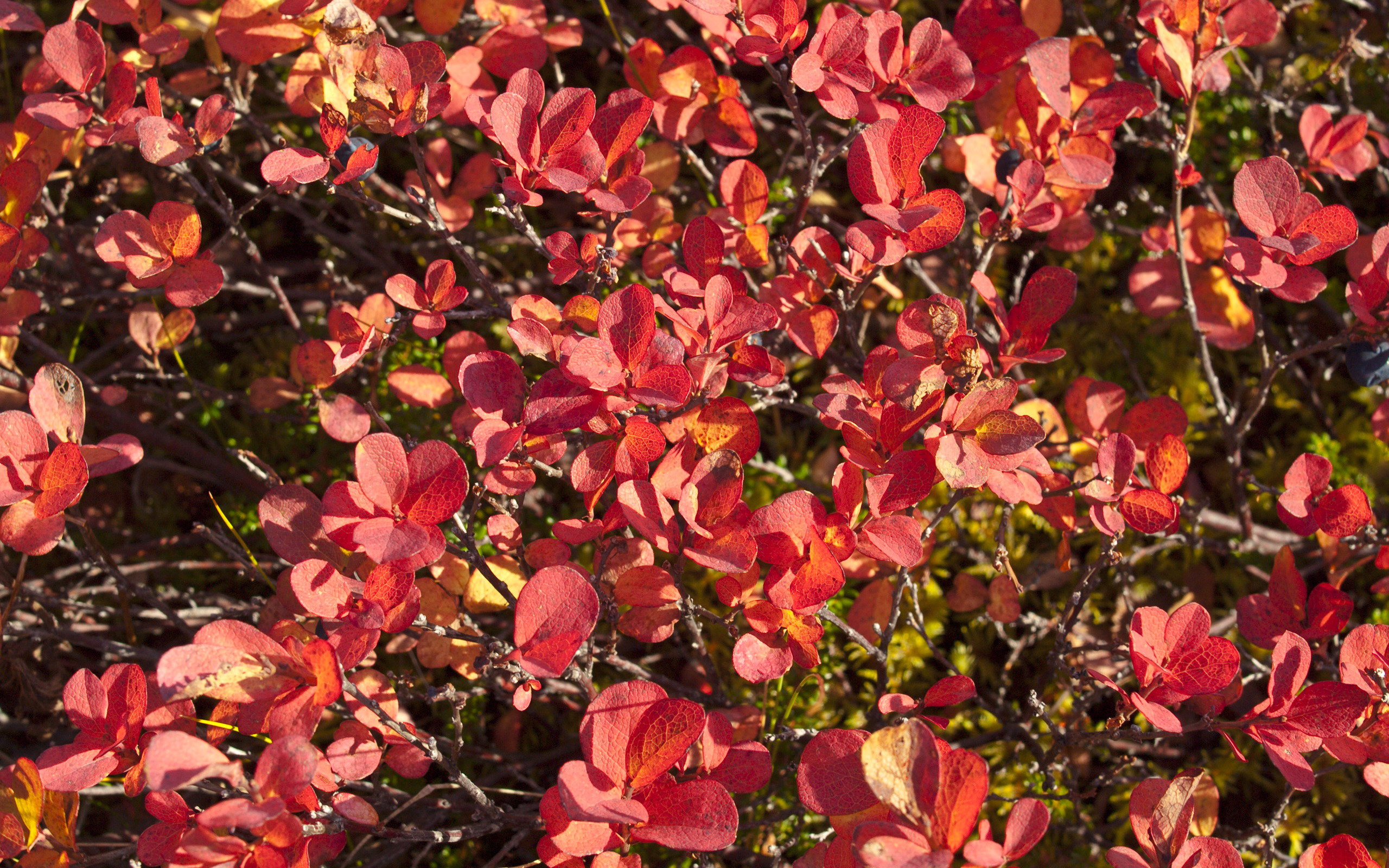 Vaccinium uliginosum